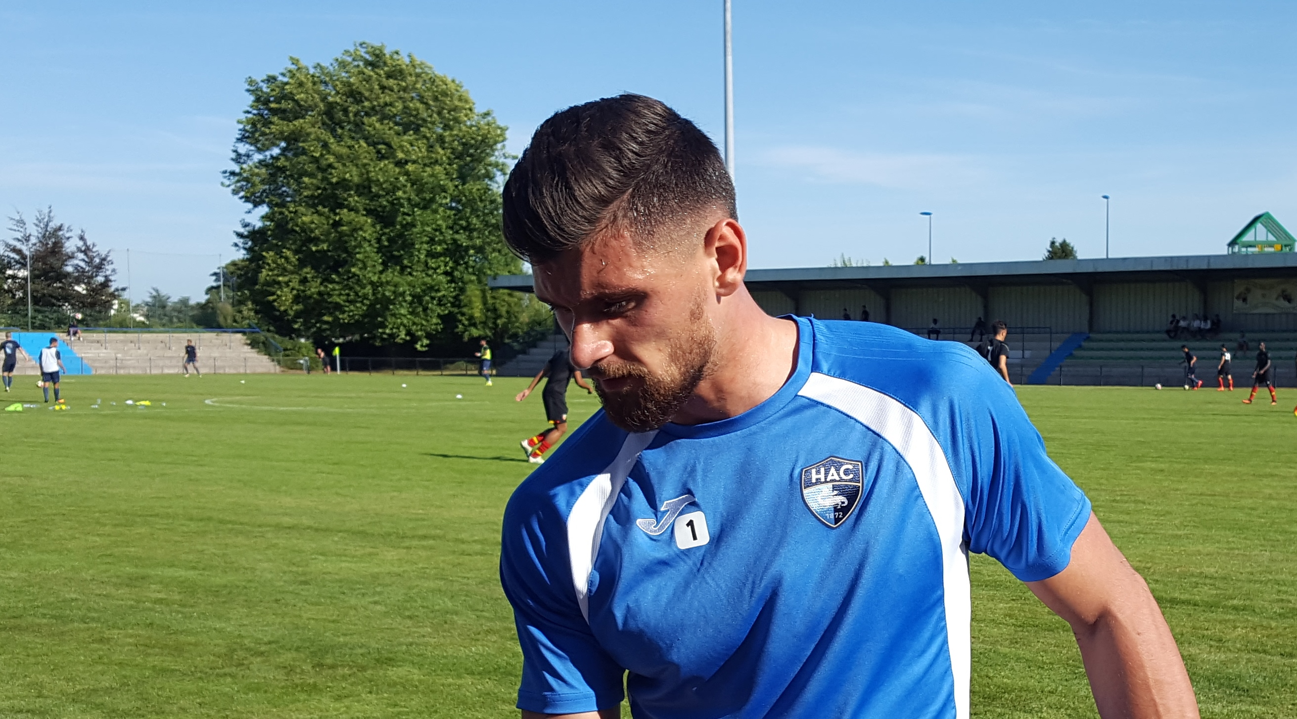 Stefan Milosavljevic avant le match RC Lens B / Le Havre B, comptant pour la première journée du Championnat de France de football amateur (CFA) 2016-2017, le13 août 2016, au Stade François Blin d'Avion